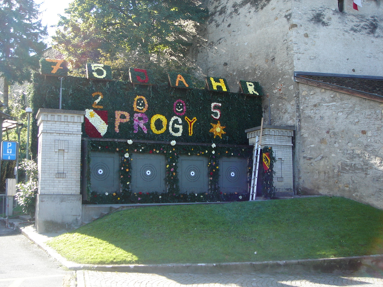 Schiessplatz “Täntsch” Thun - 2005